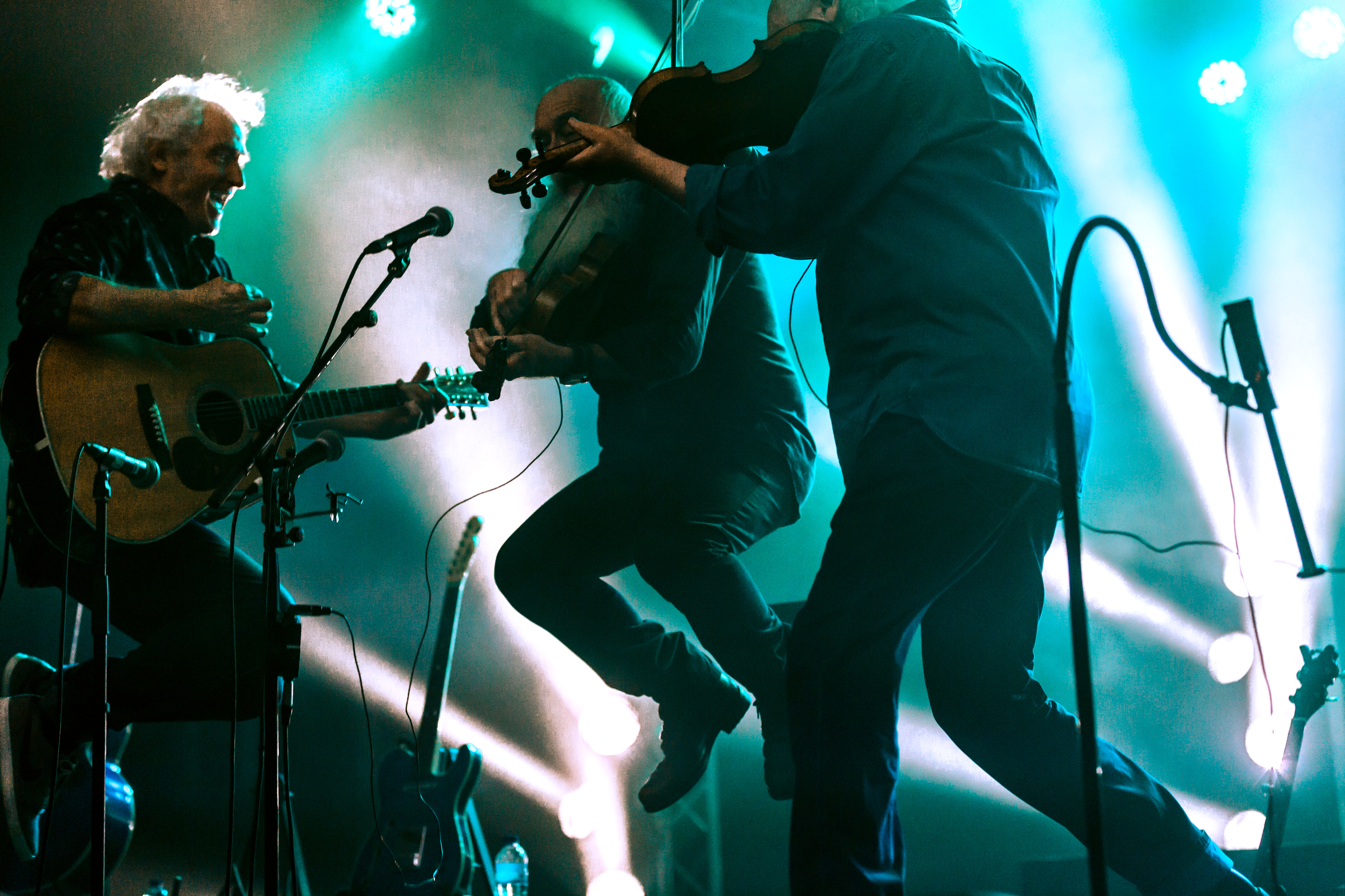 Trio EDF en concert au festival de Cornouaille à Quimper le 23 juillet 2016.